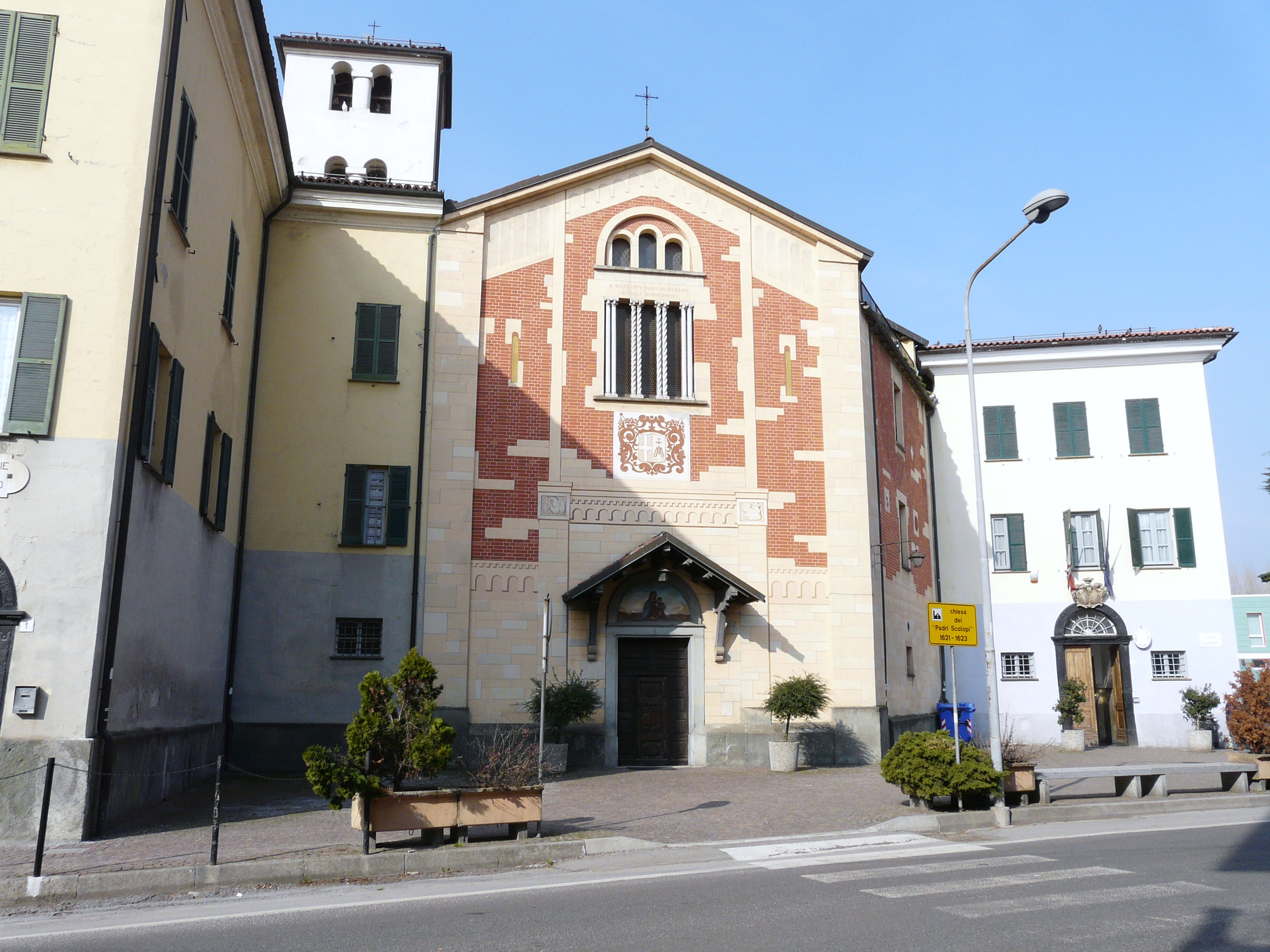 Chiesa dei Padri Scolopi, Carcare, Liguria, Italia